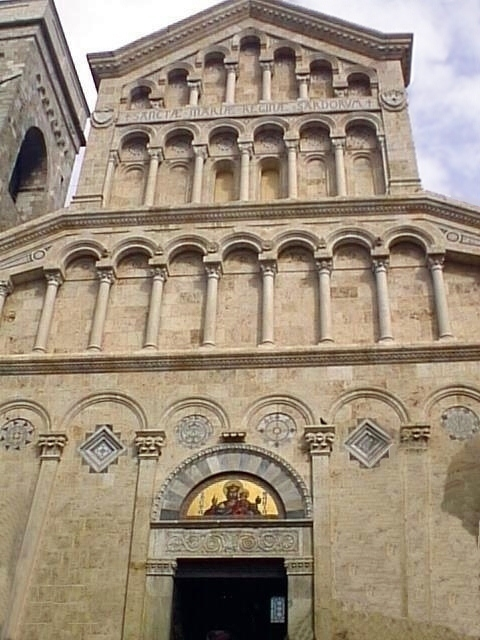 Prospetto principale della cattedrale di Cagliari.